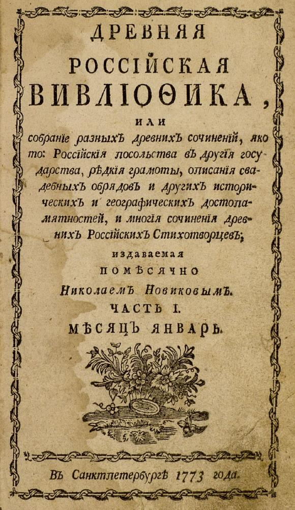 Титульный - Древняя Русская Вивлиофика изд. 1 ч. 1 1773 г.